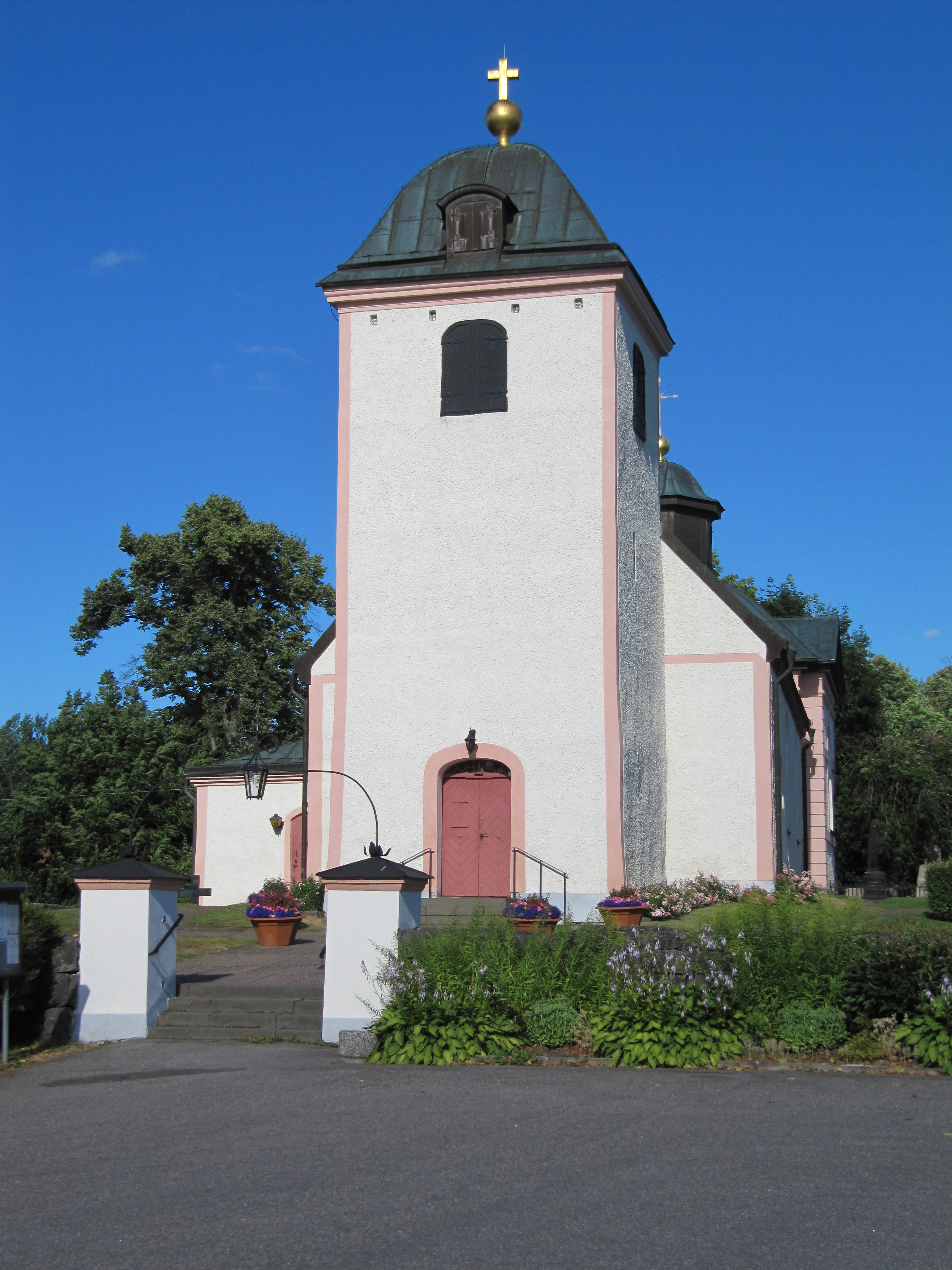 Flens kyrka